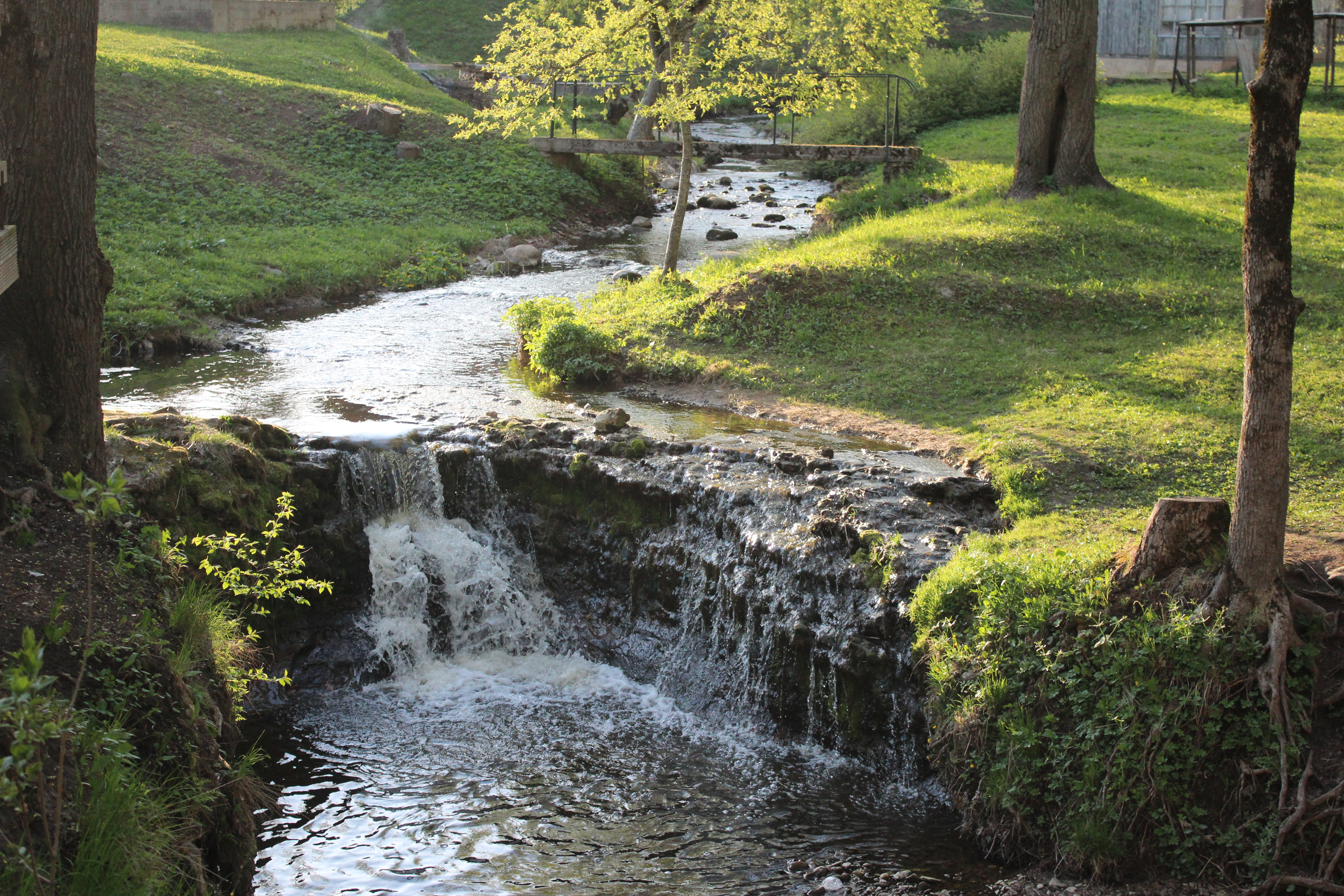 Rumbiņas ūdenskritums Lielvārdē.